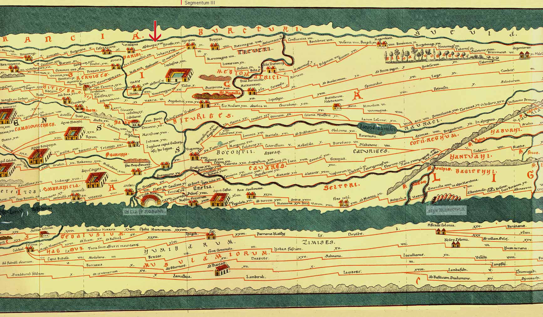 Tabula Peutingeriana, Lage von Asciburgium markiert